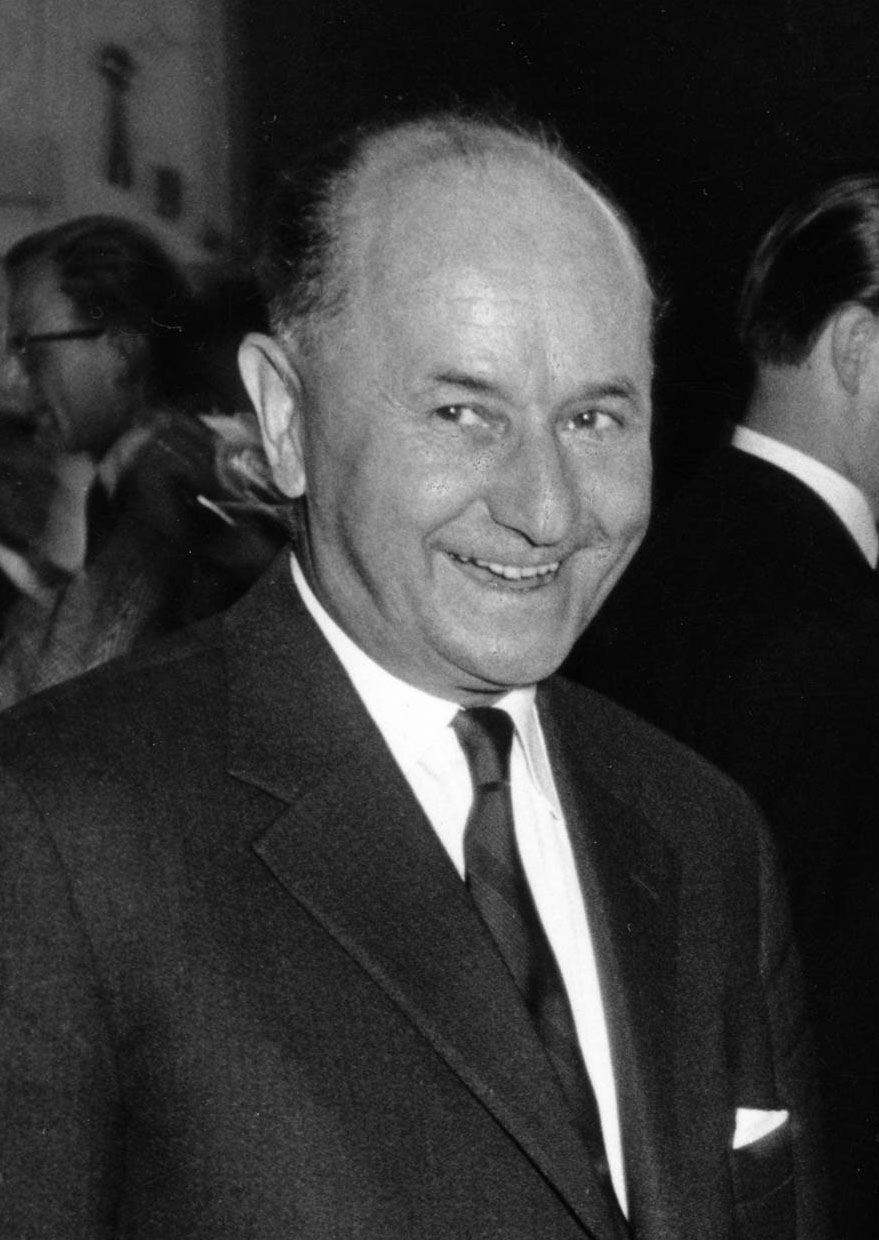 Hanns Seidel auf dem 7. CDU-Bundesparteitag, 12.05.1957 - 15.05.1957